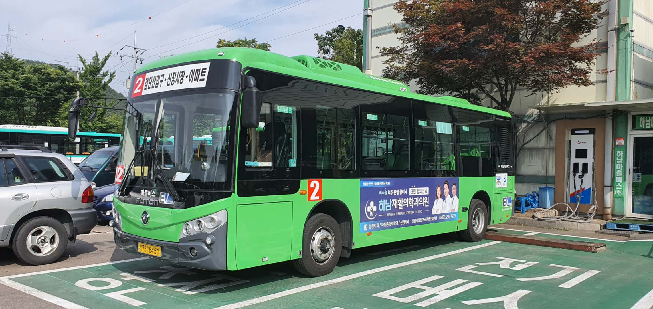 하남마을버스